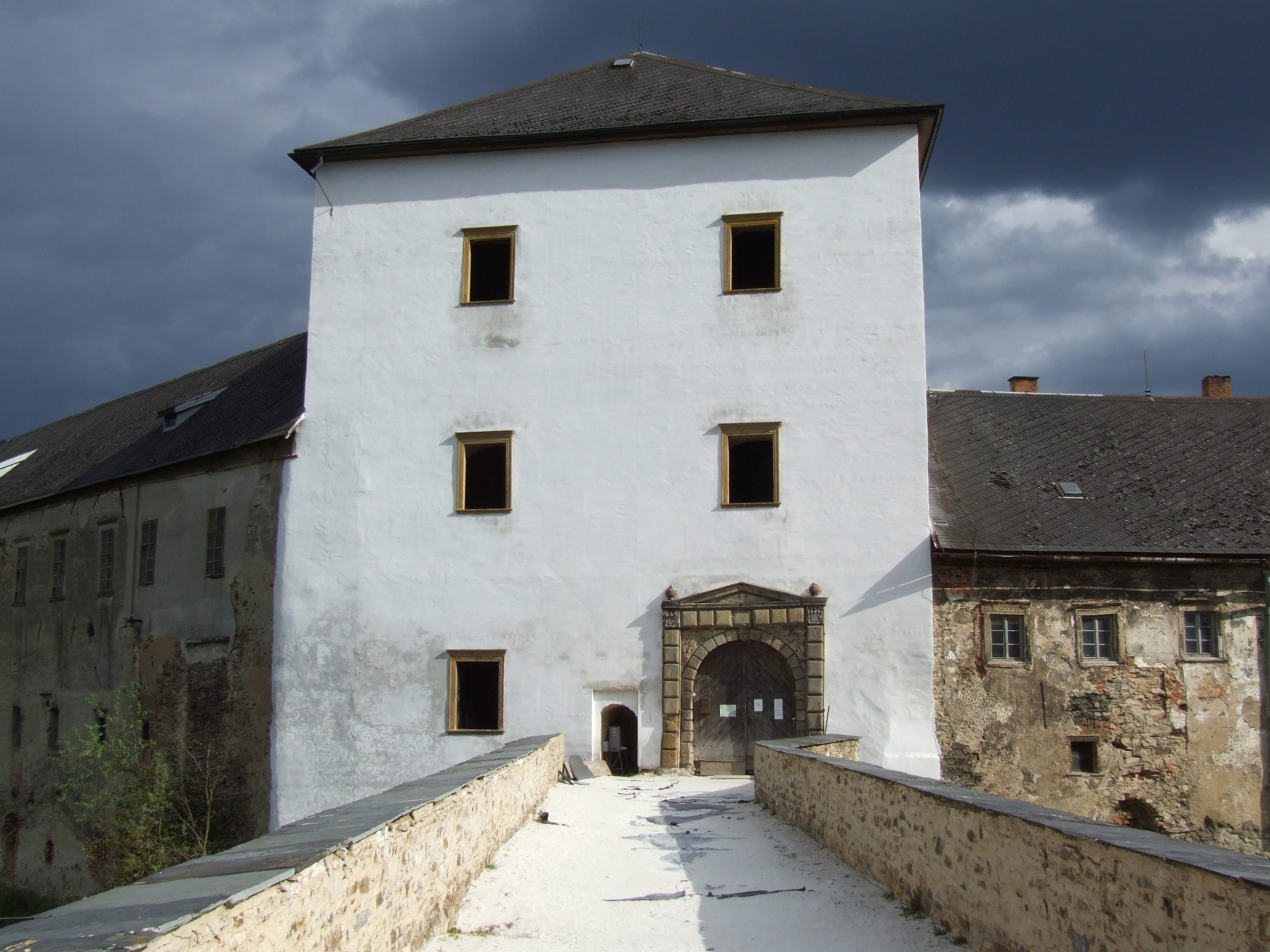 Branna (Goldenstein) - hrad Kolštejn